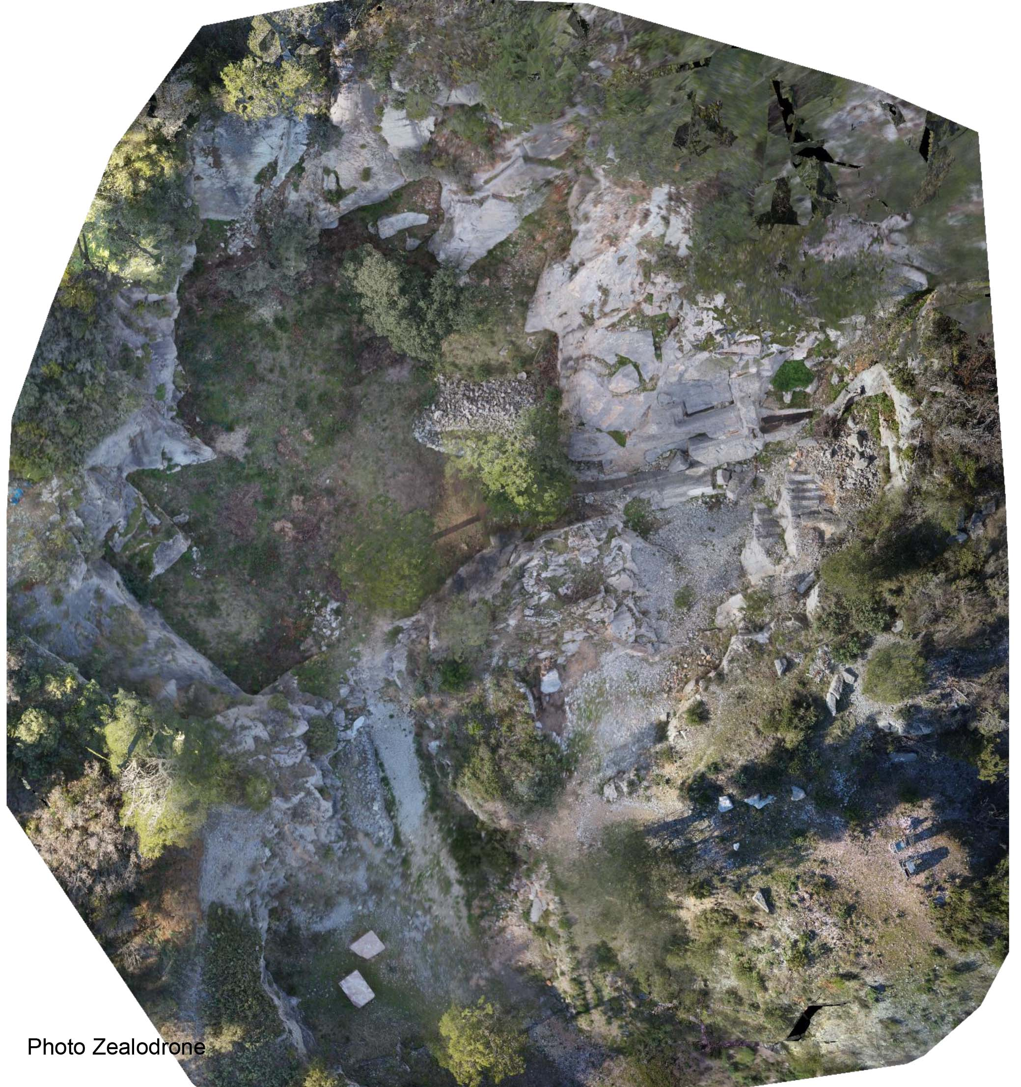 Vue de dessus